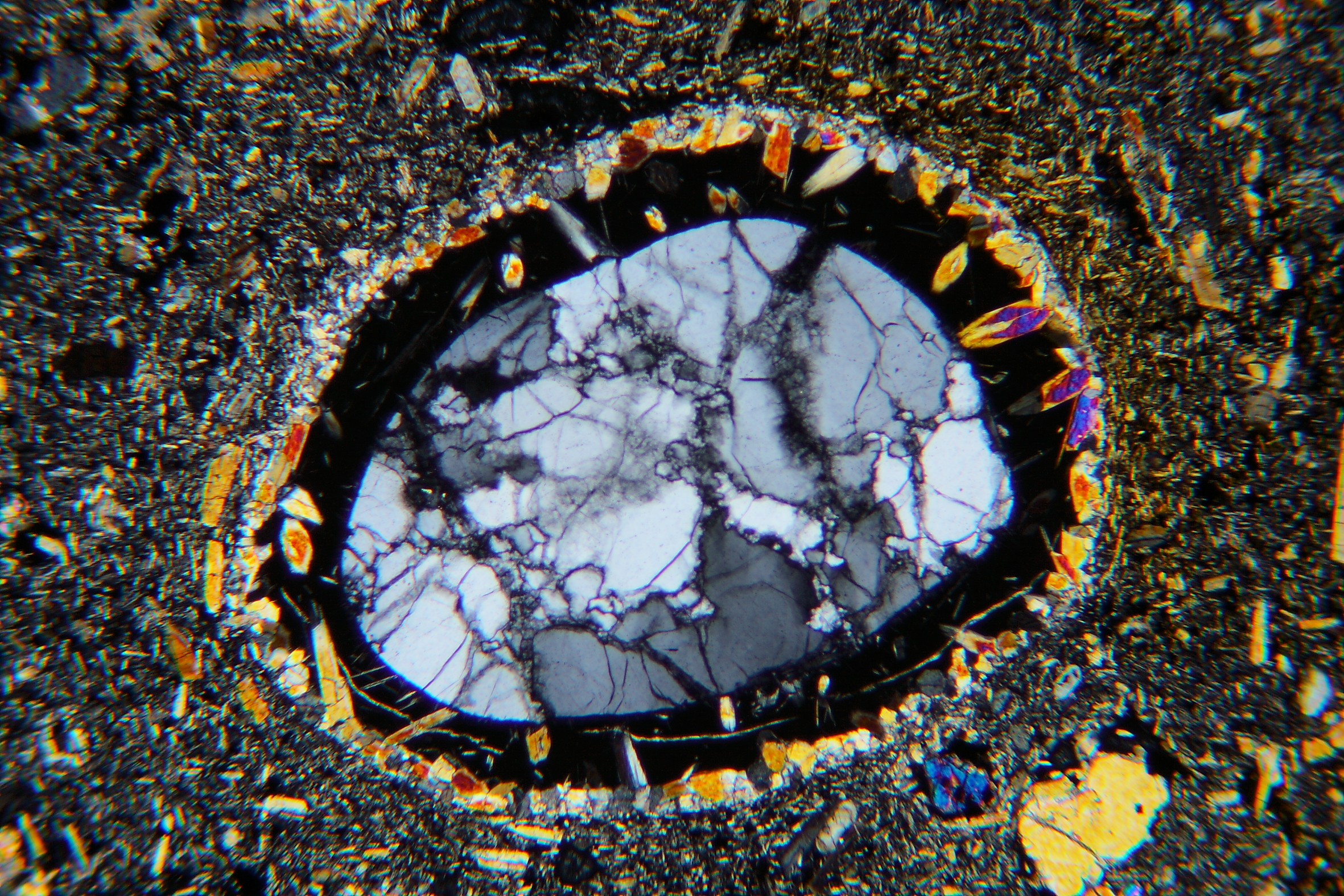 Unvollständige Assimilation und Reaktion eines quarzitischen Nebengesteins mit einem basaltischen Magma: Das (rundgeschmolzene) Quarzitrelikt ist von einer Schicht aus erstarrtem Glas umgeben, an deren Grenzfläche zum Basalt sich infolge Reaktion neue, größere Kristalle (Augit) gebildet haben. Dünnschliff, XPL.